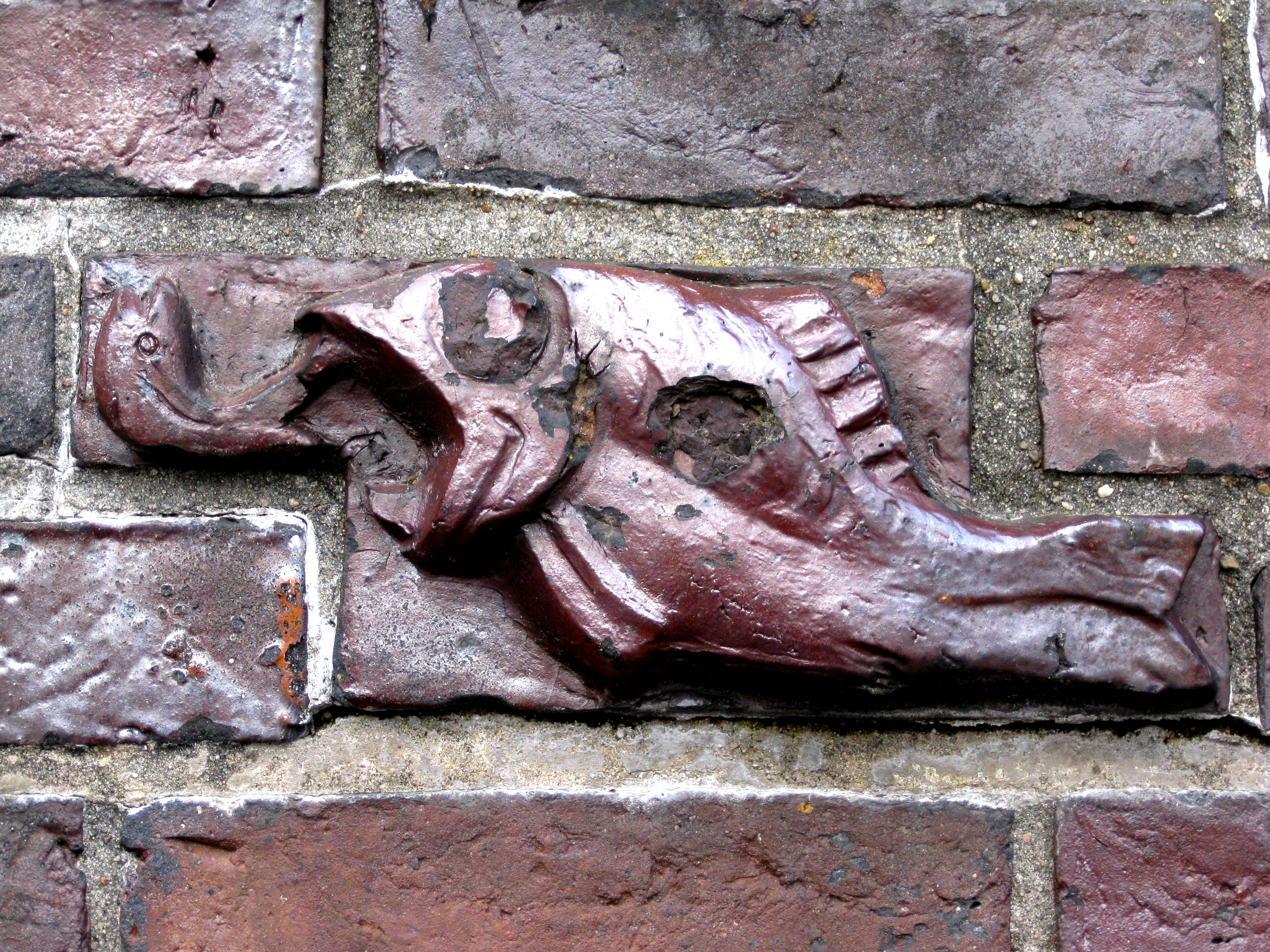 Detail am Busse-Denkmal in 27616 Bremerhaven-Geestemünde, An der Geeste. 53°32'23.77"N 8°35'11.29"ODas Busse-Denkmal ist ein geschütztes Kulturdenkmal in der Freien Hansestadt Bremen, mit der Nr. 1634 beim Landesamt für Denkmalpflege registriert.